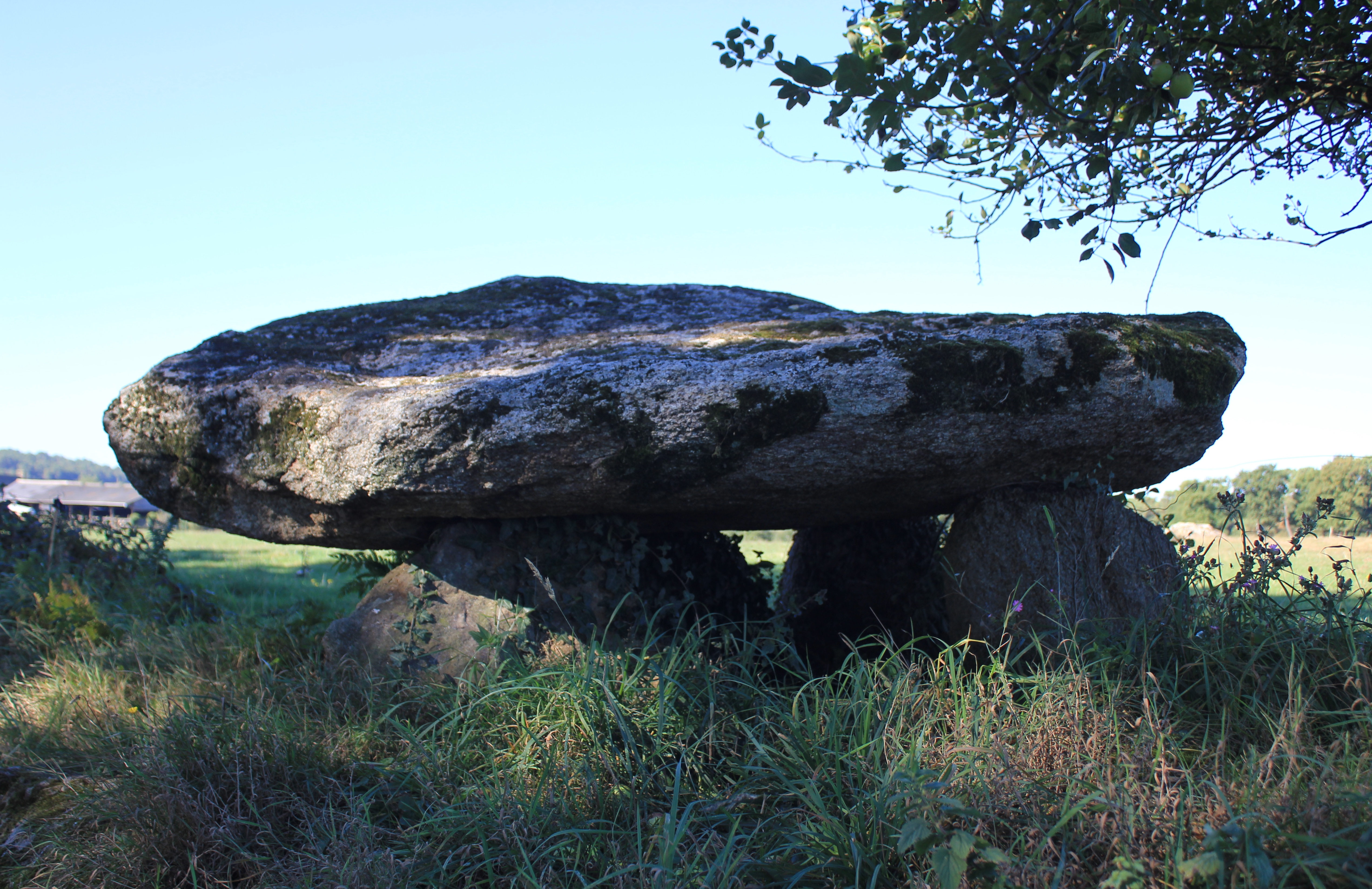 Dolmen de Kermorvant (Moustoir-Ac) .